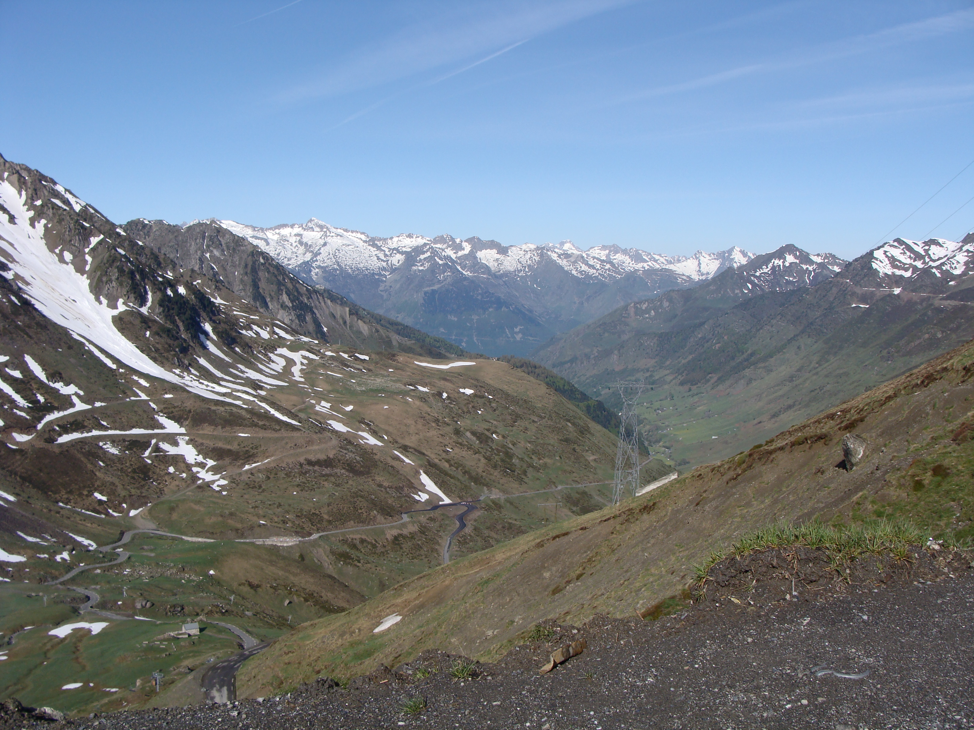 Pays Toy - Du col du Tourmalet vue sur la Vallée de Baréges